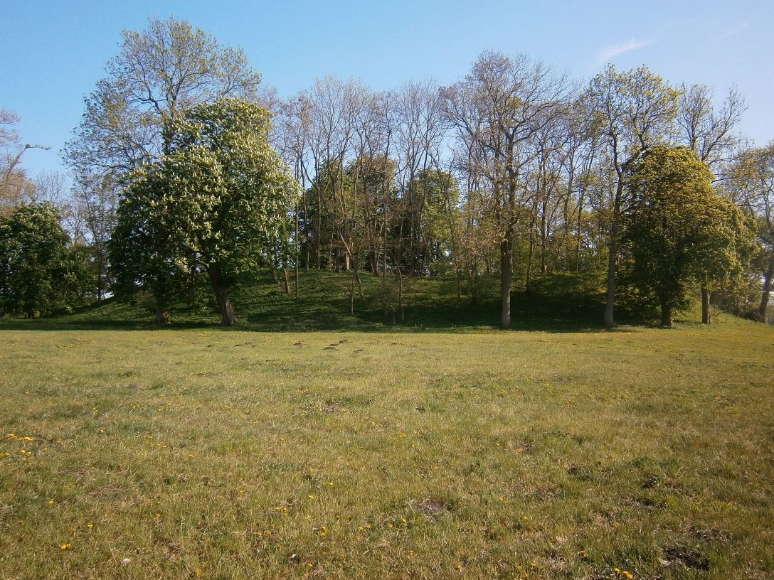 Der slawische Burgwall Clausdorf in Mecklenburg Vorpommern